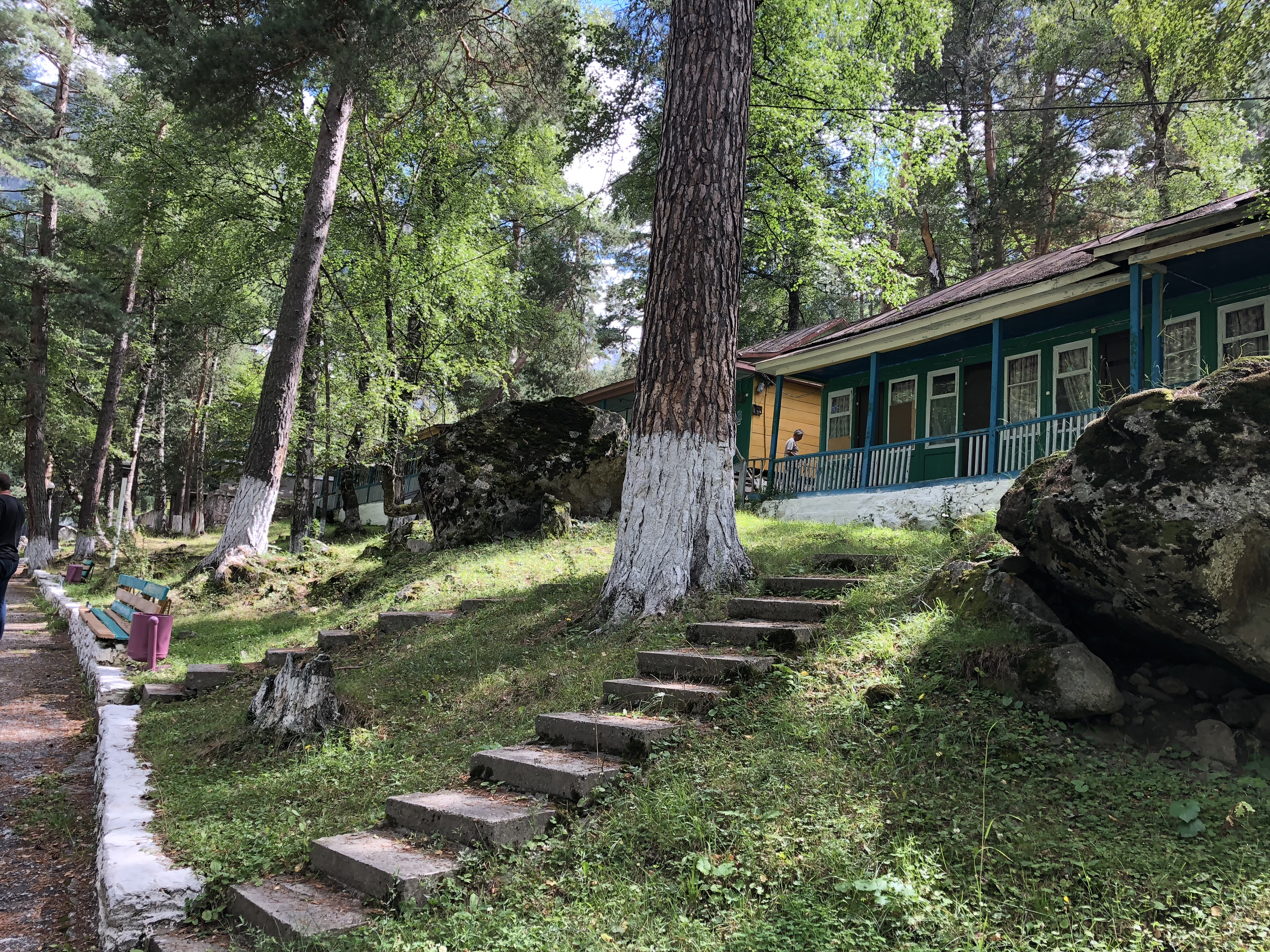 Альплагерь Шхельда. База отдыха "Шхельда". Шхельда. Колыбель альпинизма